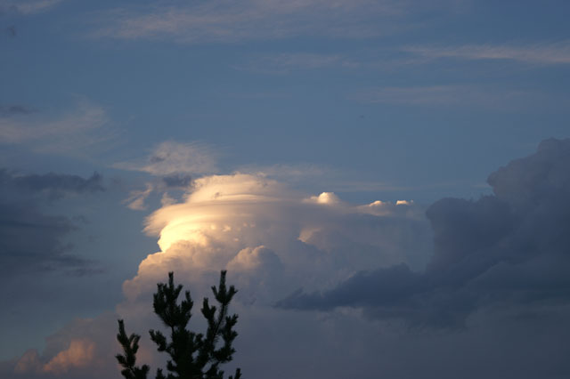 Pileus